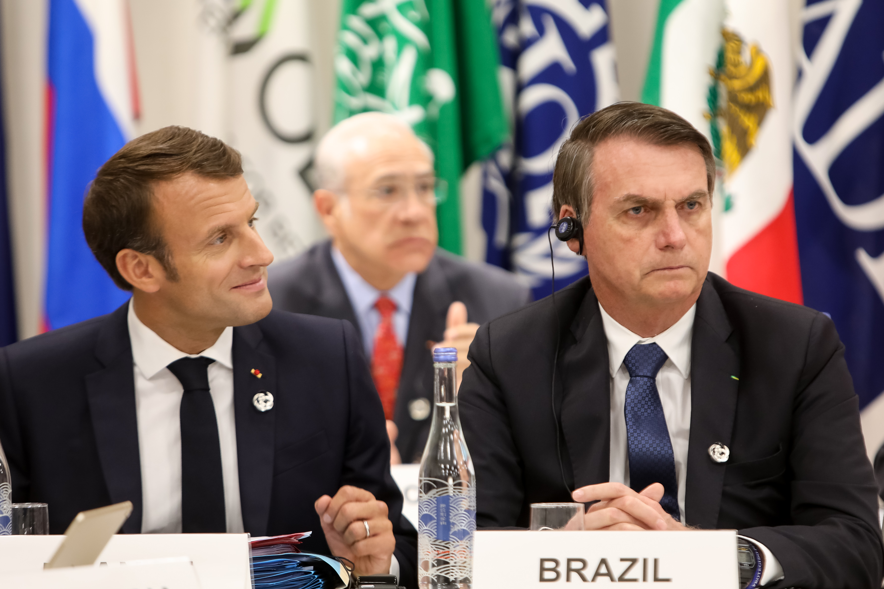 (Osaka - Japão, 28/06/2019) Presidente da República, Jair Bolsonaro, durante Reunião Paralela dos Líderes do G20, sobre Economia Digital. Foto: Clauber Cleber Caetano/PR